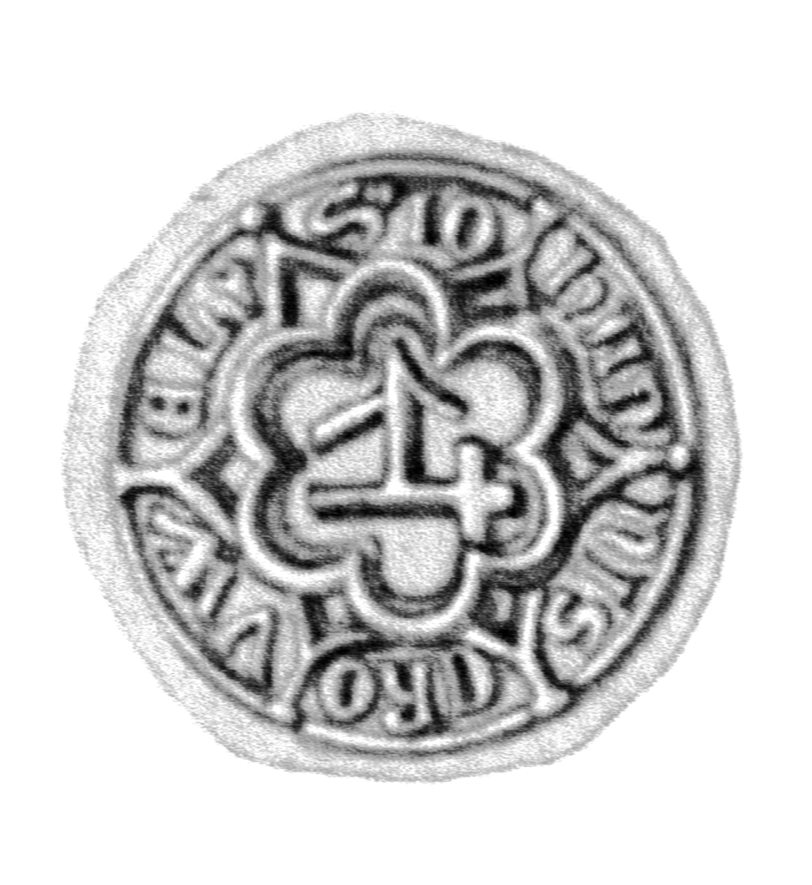 Siegel des Ratsmannes Johann Crowel. Das Siegel stammt aus der Zeit um 1411. Siehe Emil Ferdinand Fehling: Lübeckische Ratslinie, Nr. 452 (Johann Krowel).